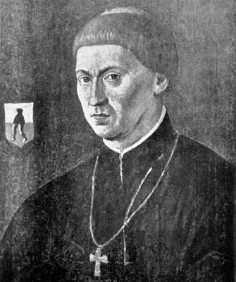 Łukasz Watzenrode